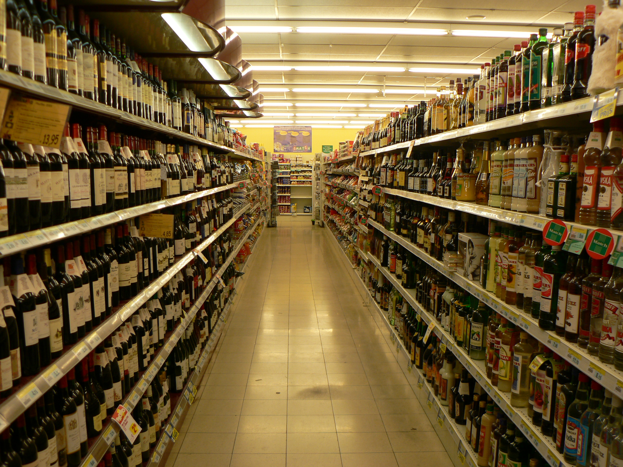 Smatch supermarket, Deerlijk, Belgium